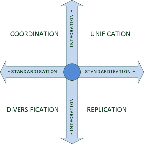 Modèle opérationel